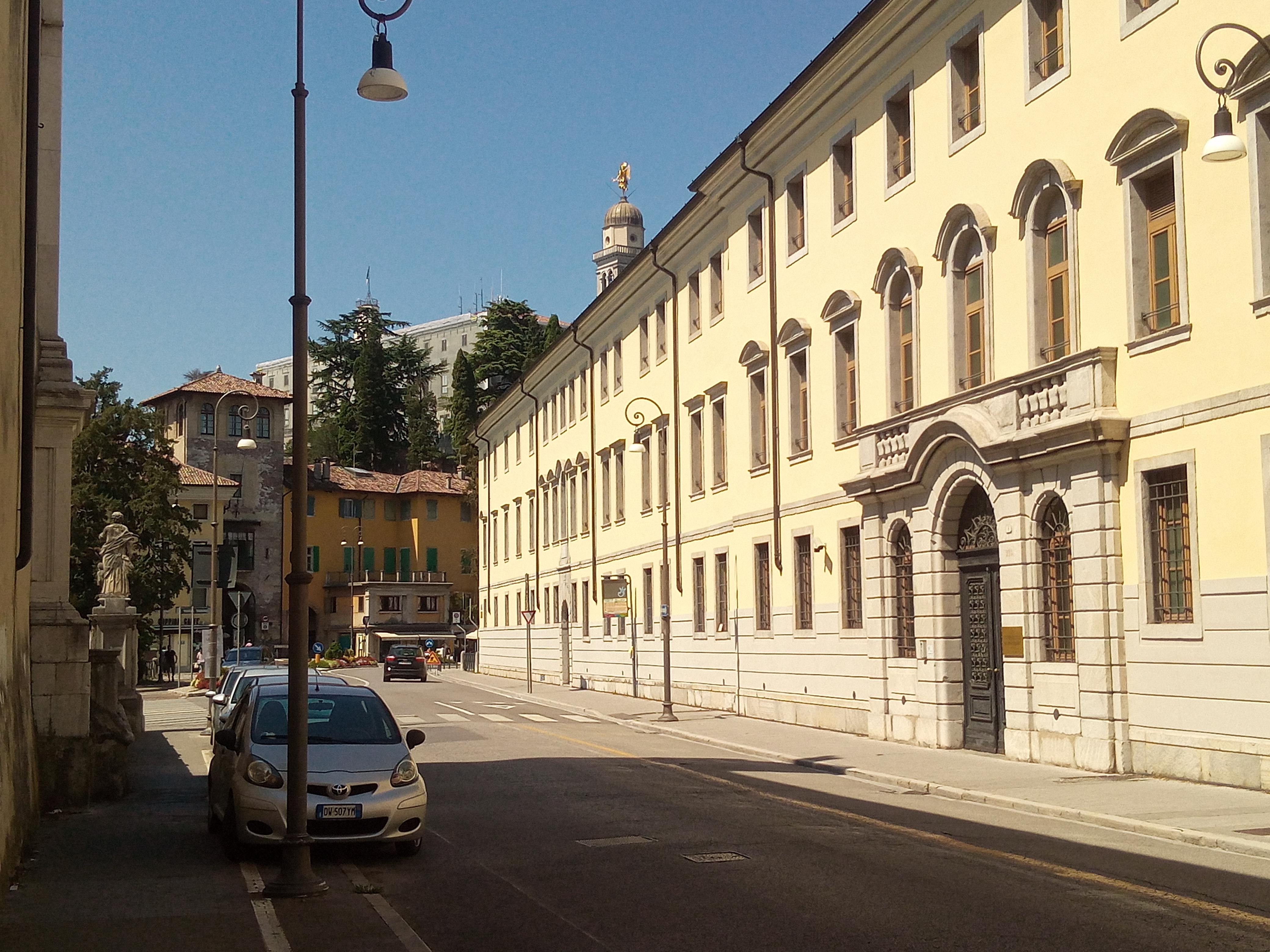 Udine: la facciata del conservatorio Jacopo Tomadini su via Treppo; sullo sfondo, porta Manin e il castello in restauro, con il campanile e il suo angelo dorato